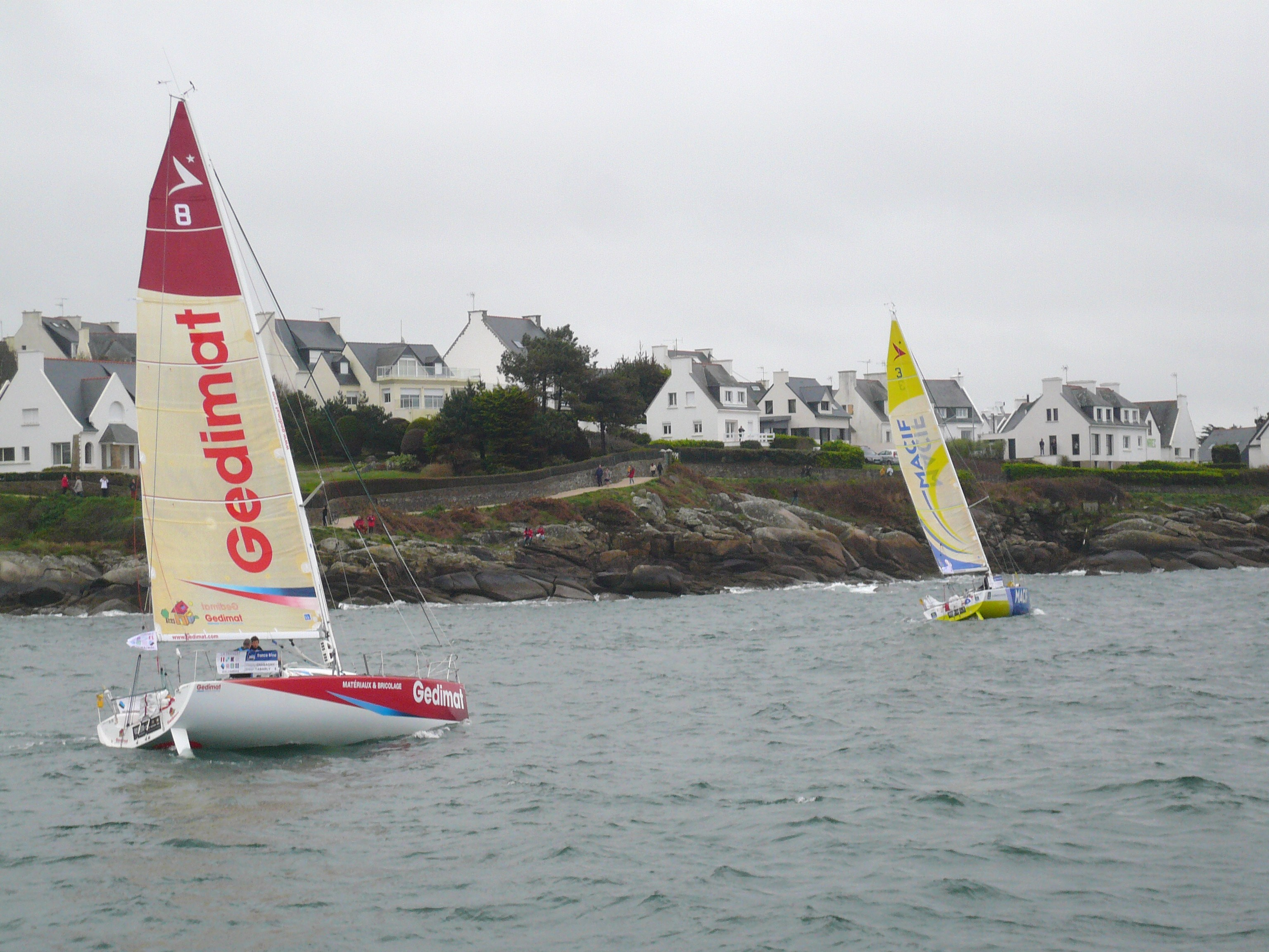 Le voilier de classe Figaro « Gedimat », skippé par Thierry Chabagny et Erwan Tabarly, suit « Skipper MACIF » skippé par Fabien Delahaye et Yoann Richomme, lors de la sortie du port de Concarneau pendant la transat AG2R-La Mondiale 2014. Concarneau, Finistère, Bretagne, France.